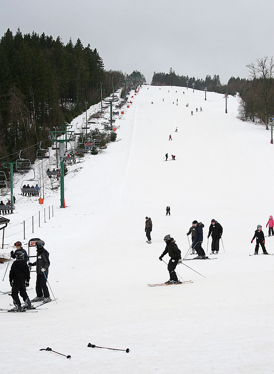 Skidåkning på Vallåsen.